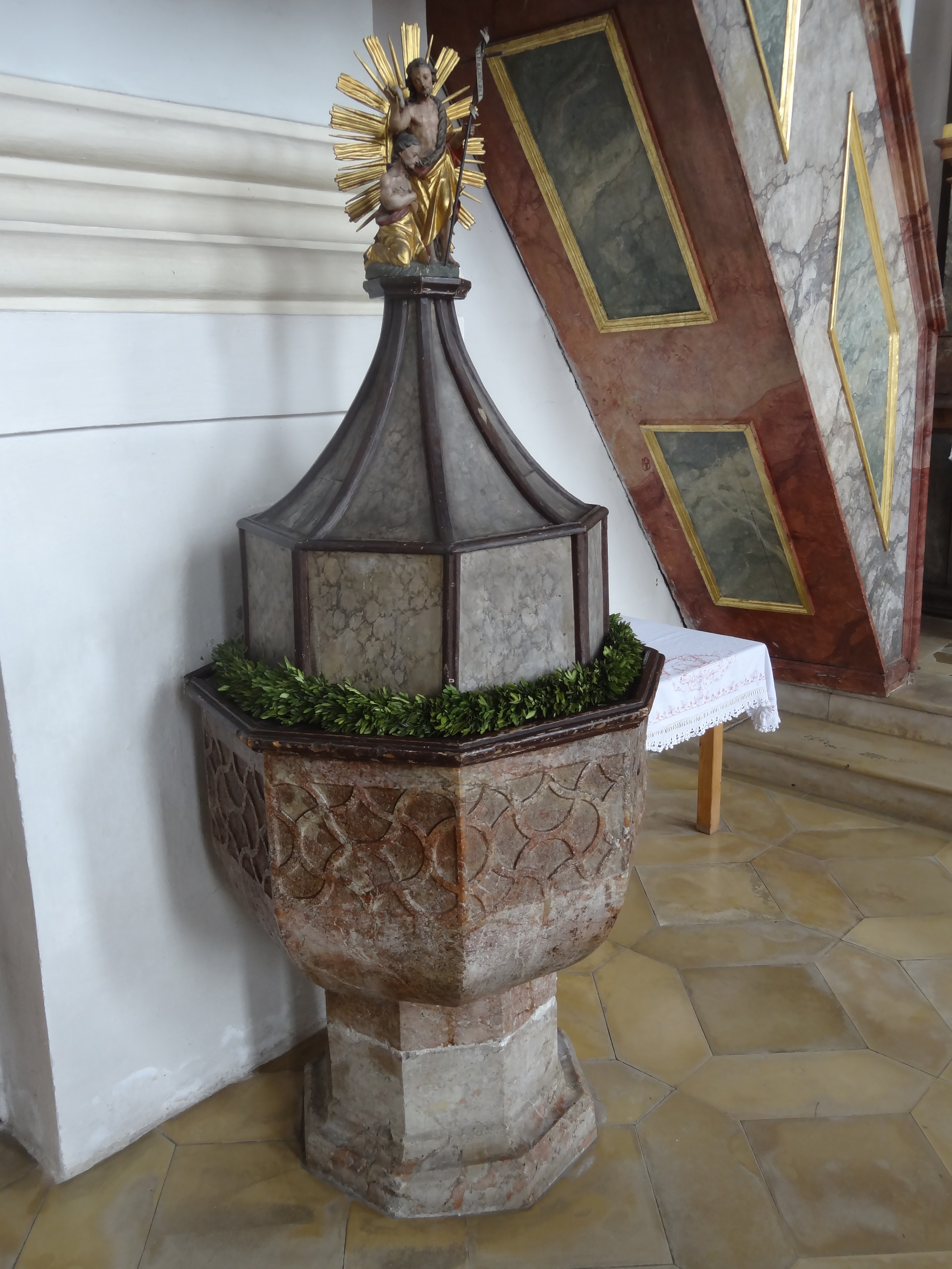 Taufstein in der kath. Pfarrkirche Mariä Geburt im Markt Wartenberg (Landkreis Erding, Oberbayern)